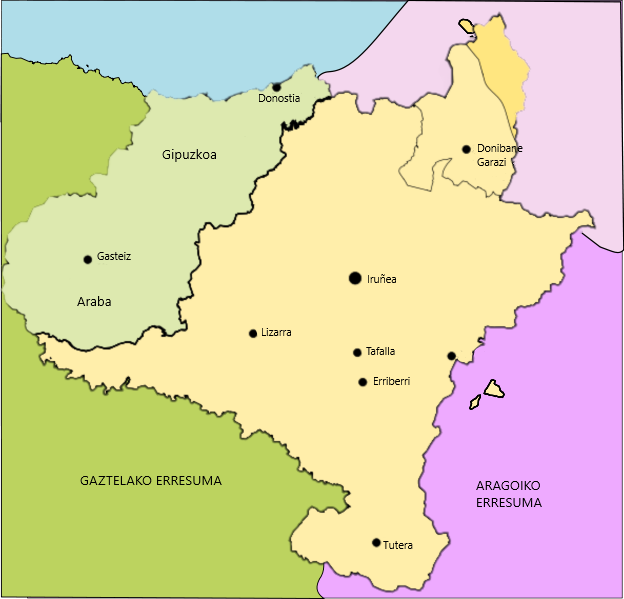 Nafarroako Erresuma Antso Indartsuaren erregealdian Nafarroako Erresuma Gaztelak konkistatutako lurraldeak (1198-1200) Basailutza bidez lortutako lurraldeak (1196-1203) Gaztelako Erresuma Aragoiko Erresuma